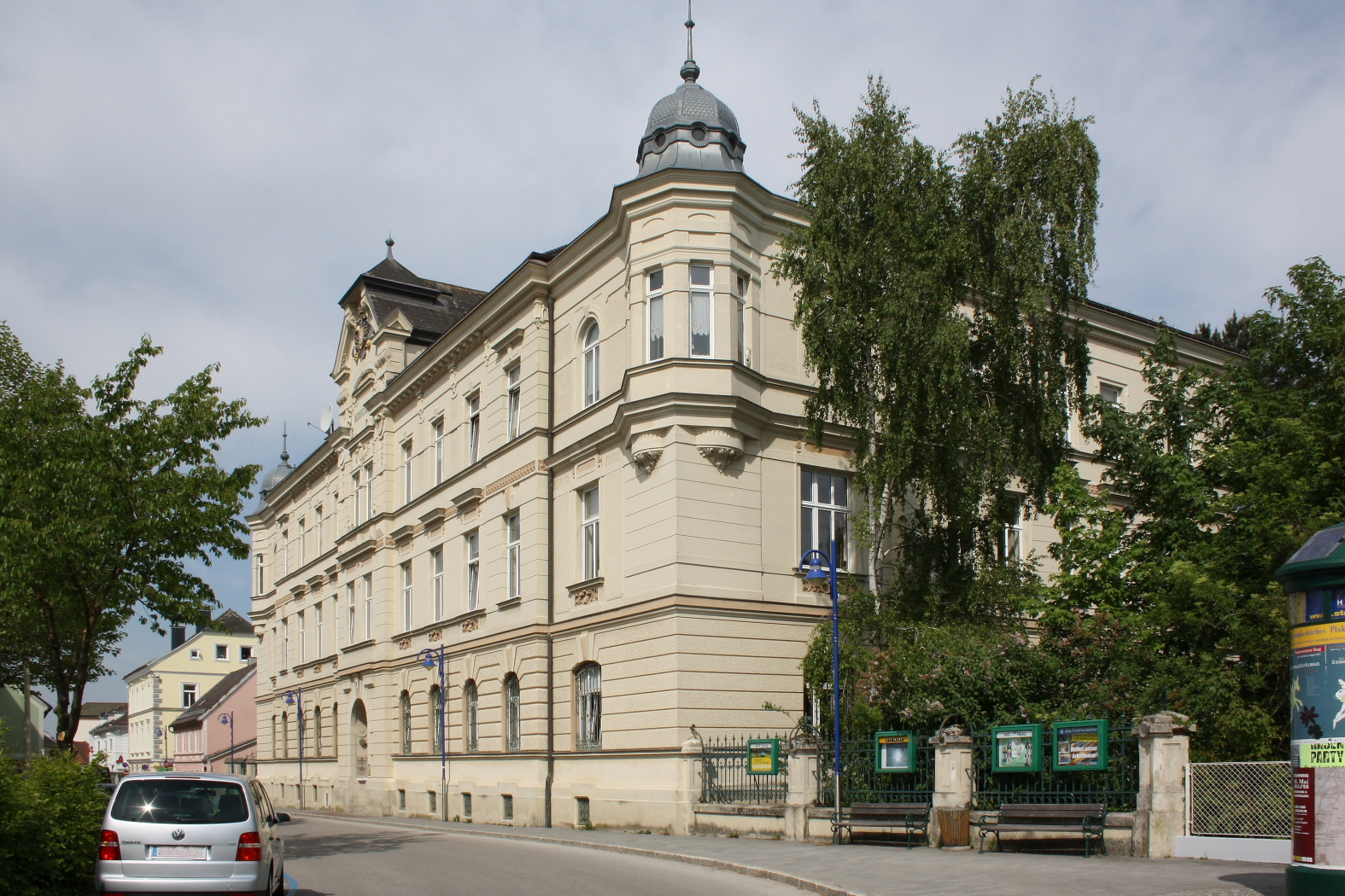 Das Bezirksgericht in Haag. Ein späthistoristischer Bau von Anton Gürlich, der in den Jahren 1902/03 errichtet wurde.